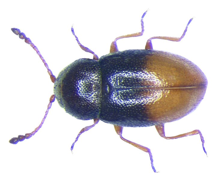 Atomaria mesomela (Herbst, 1793) Familie: Cryptophagidae Grösse: 1,3-1,7 mm Verbreitung: Europa Ökologie: in Feuchtgebieten Fundort: Germania, Bayern, Oberfranken, Selbitz leg. det. U.Schmidt, 2006 Foto: U.Schmidt, 2007